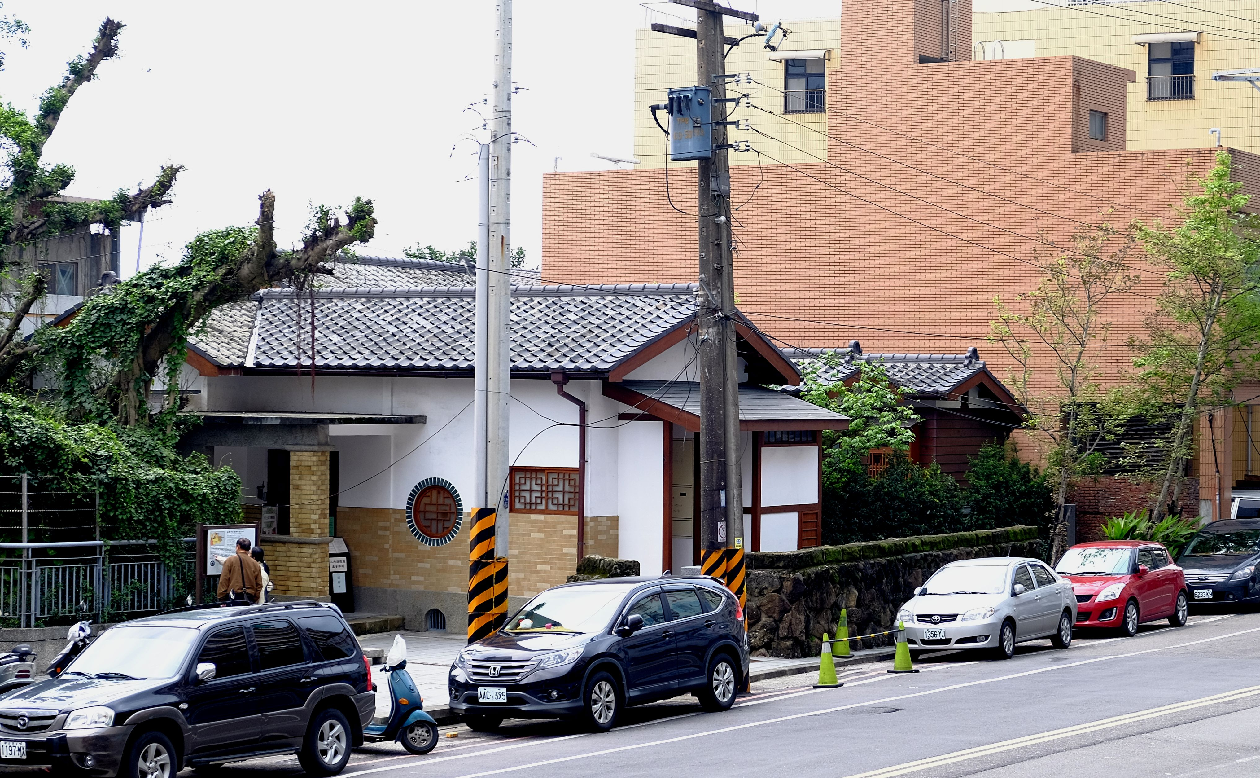 基隆市歷史建築市長官邸